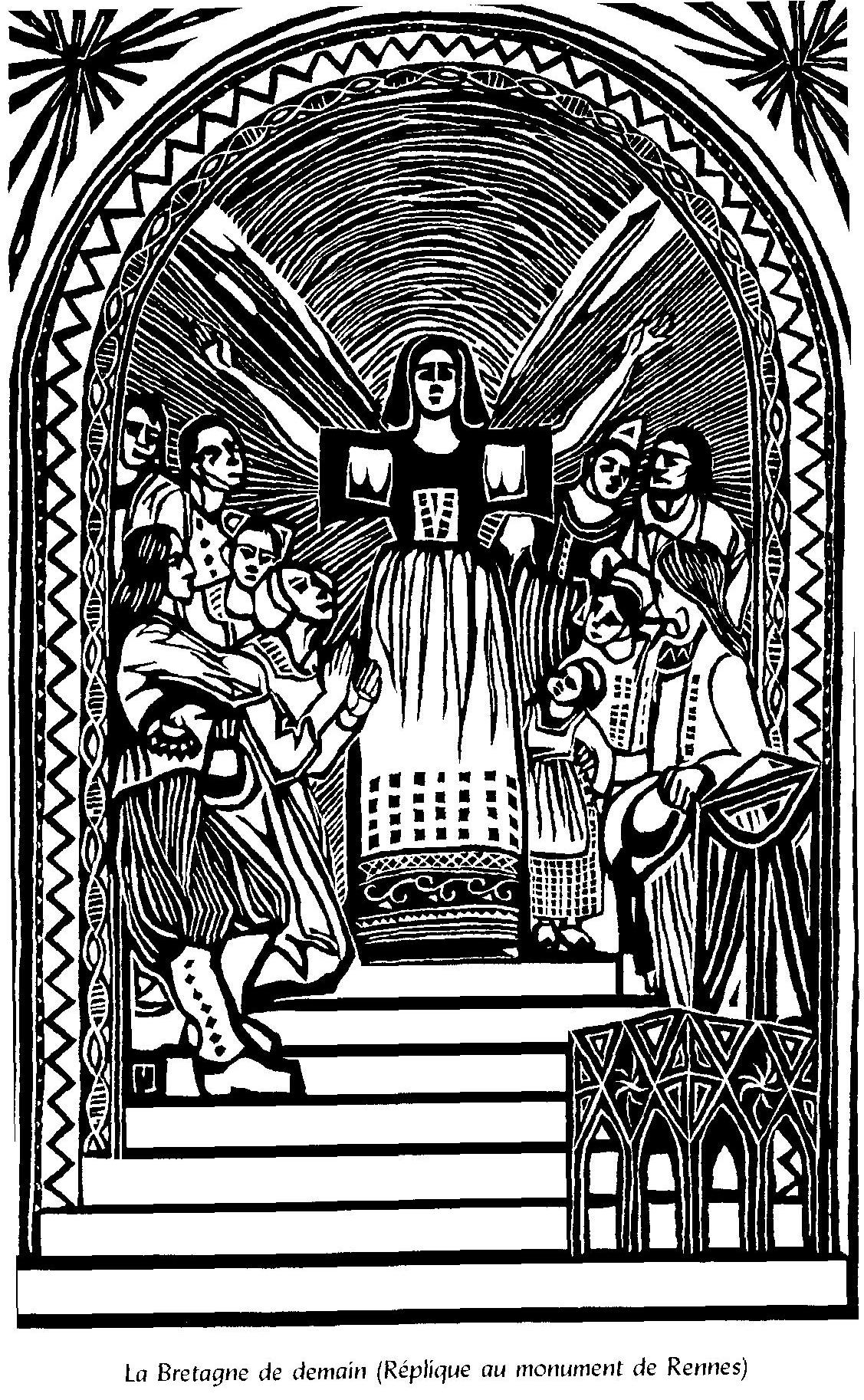 illustration from L'Histoire de Notre Bretagne, 1922 pastiching Jean Boucher's monument at Rennes